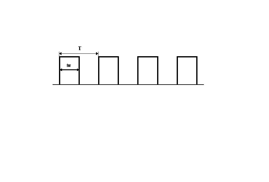 Период, продължителност и коефициент на запълване на импулсен сигнал.